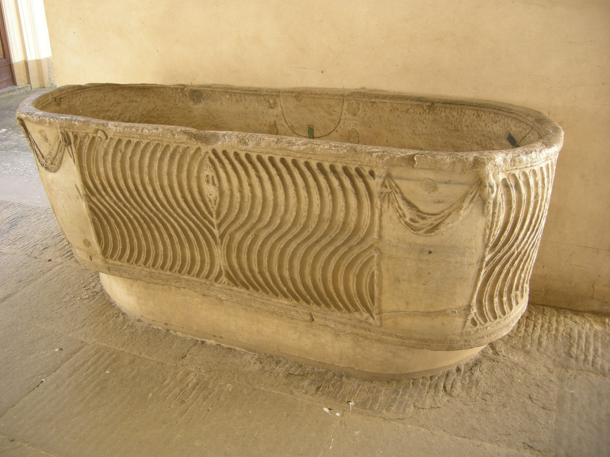 Villa di poggio a caiano, sarcofago romano